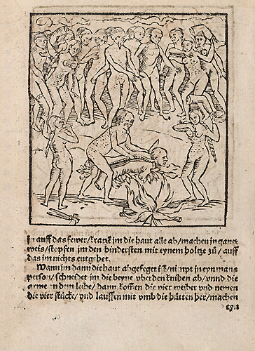 Ilustração retrata cena de canibalismo, descrita por Hans Staden, em meados do século XVI